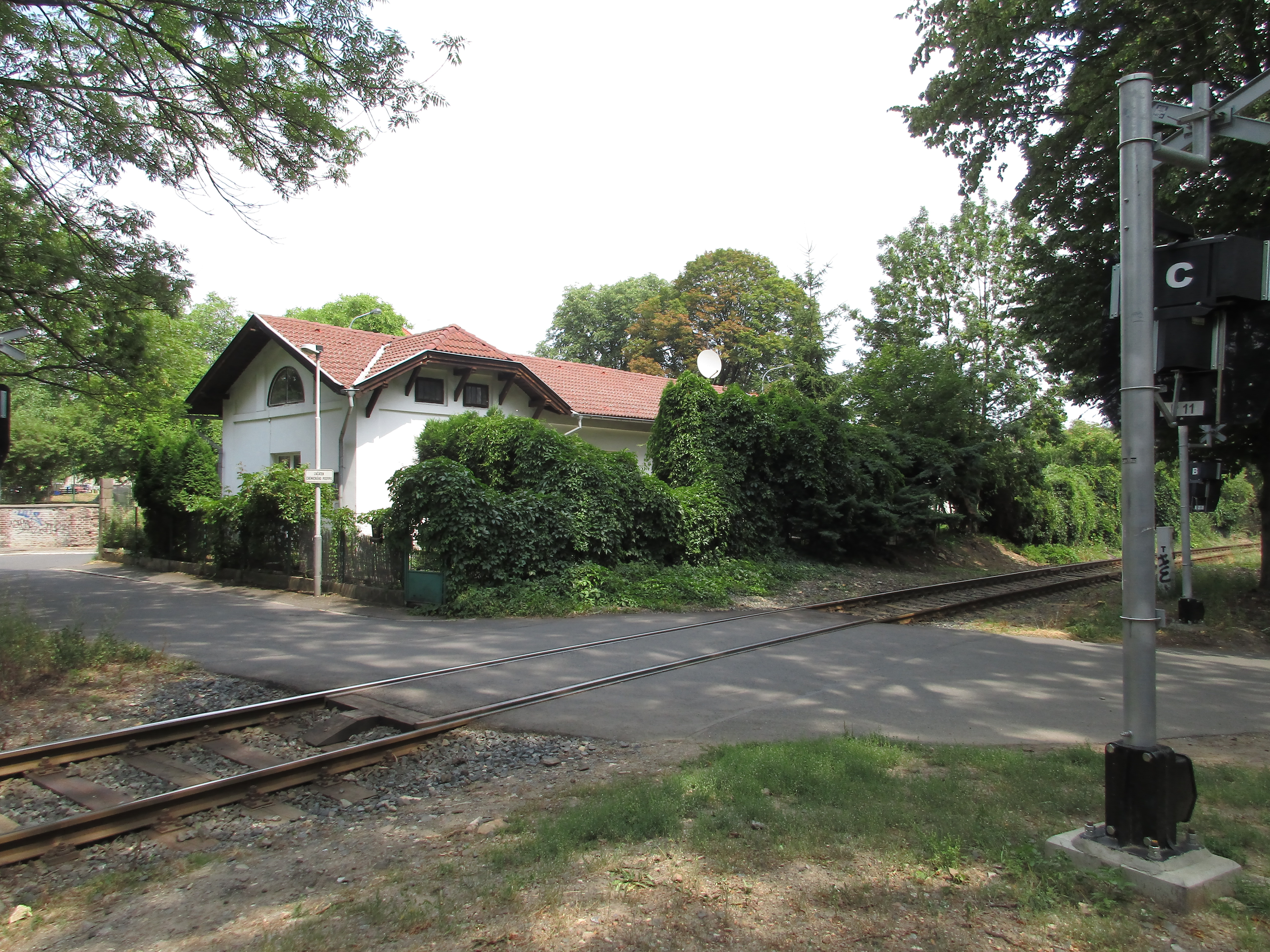 Praha-Liboc, bývalá železniční zastávka (1863-1984).